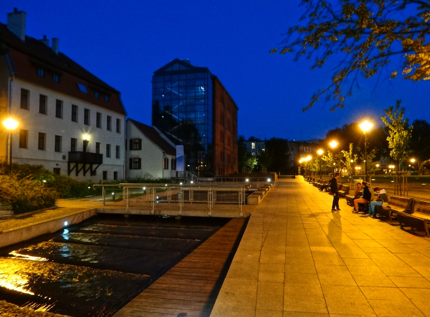 Kaskada Międzywodzie na Wyspie Młyńskiej w Bydgoszczy, odtworzona w 2007 roku